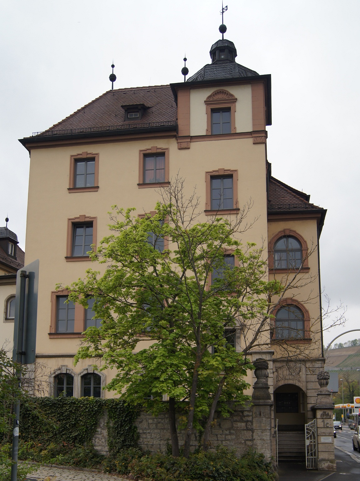 ehemaliges Hauptzollamt in Würzburg, Gebäude mit Dienstwohnungen